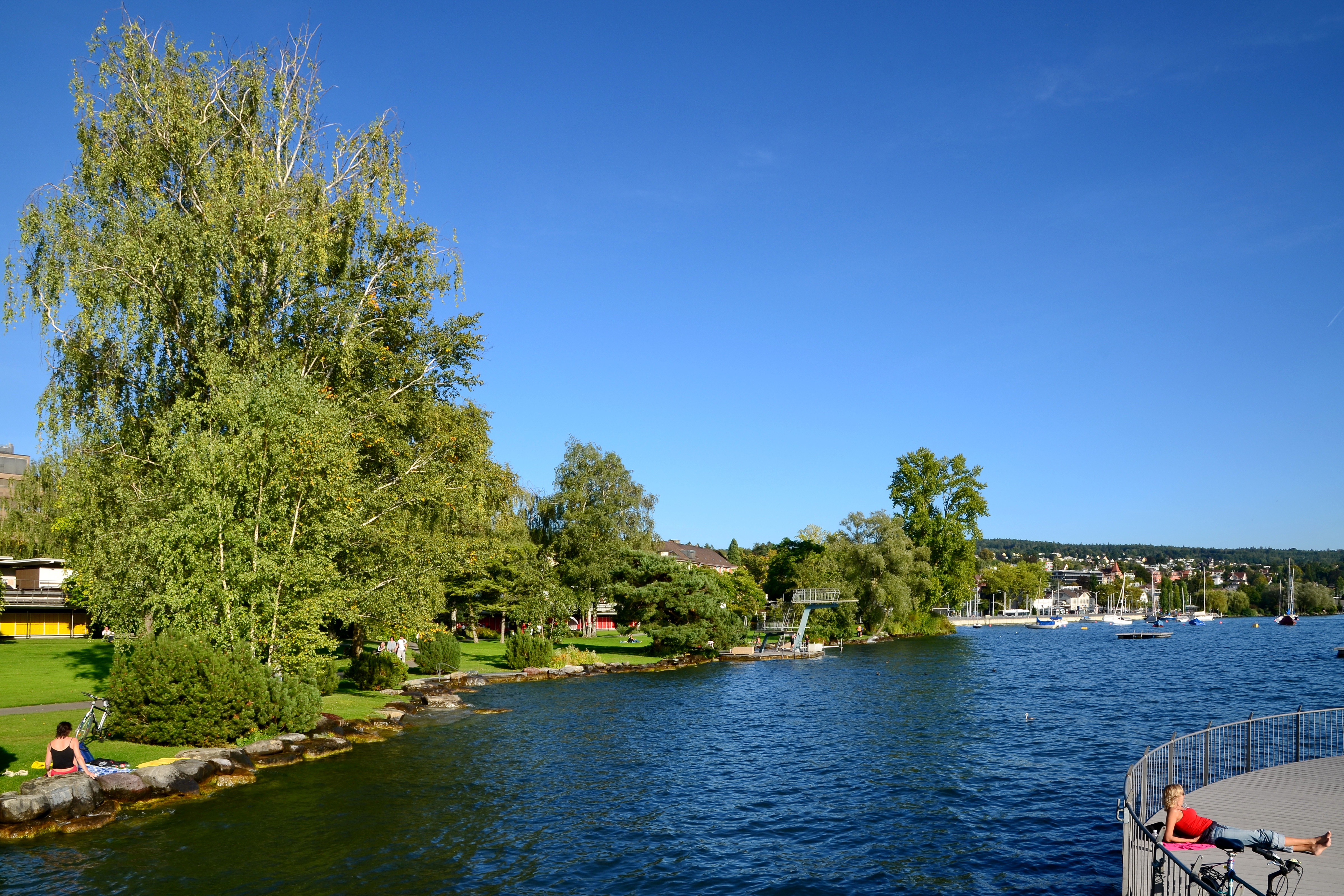 Strandbad Tiefenbrunnen at Zürichhorn in Zürich-Seefeld